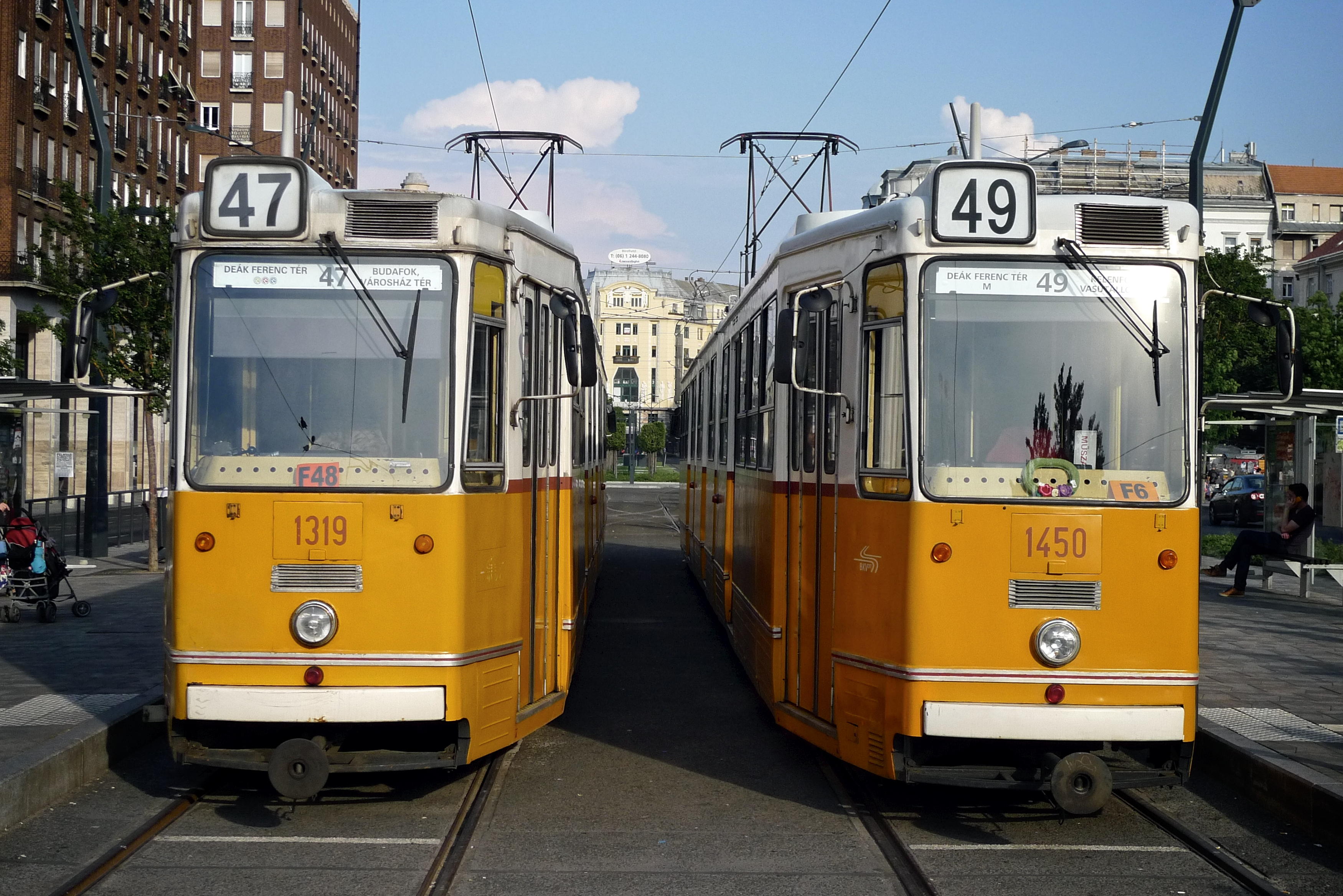 Budapest trams